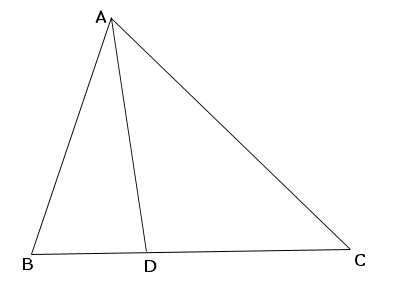 Триъгълник ABC, апотема AD, D e [BC]